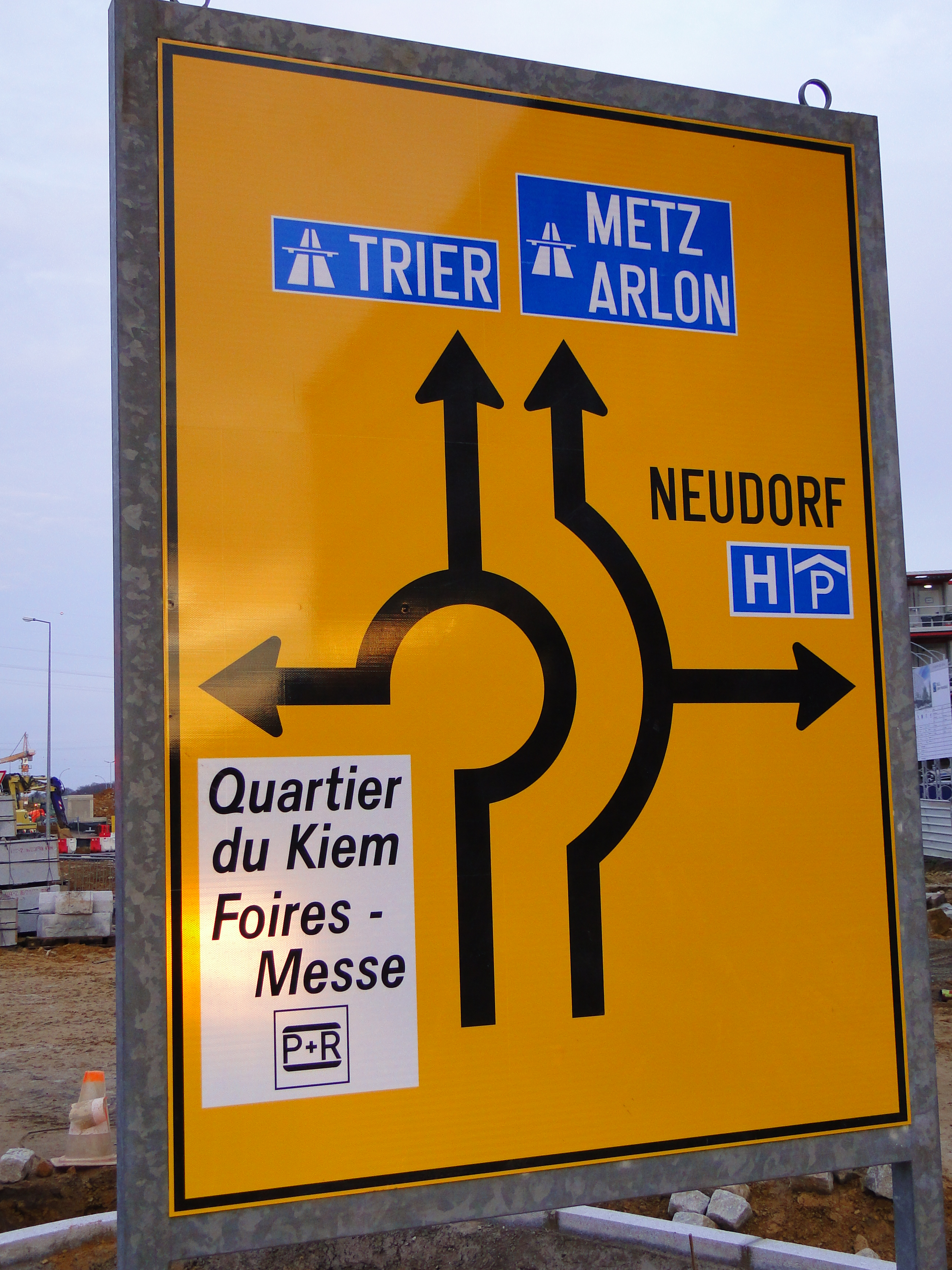 Rond-point Serra: travaux préparatoires pour la mise en service en "rond-point Turbo". Signalisation à l'accès du rond-point depuis l'avenue John F. Kennedy